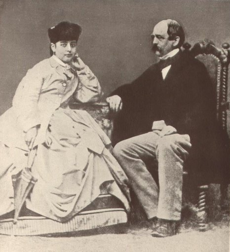 Famous opera singer Pauline Lucca with Otto von Bismarck, 1865 in Gastein (from the original description: Bismarck versuchte das Erscheinen des Bildes in der Öffentlichkeit zu verhindern, es gelang ihm nicht (?)